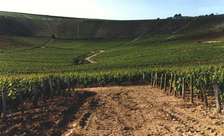 Photo du cirque de Bué, ville des viticulteurs